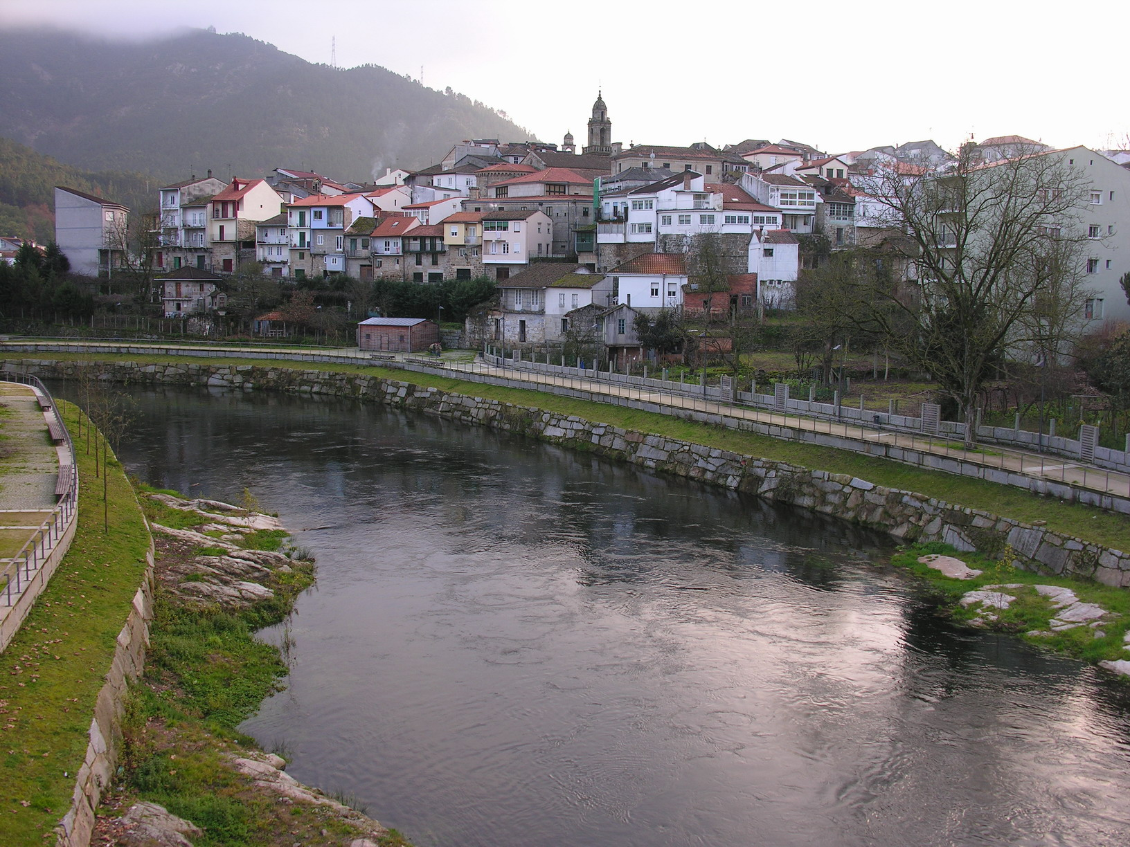 self made. Ribadavia - Galicia - Spain